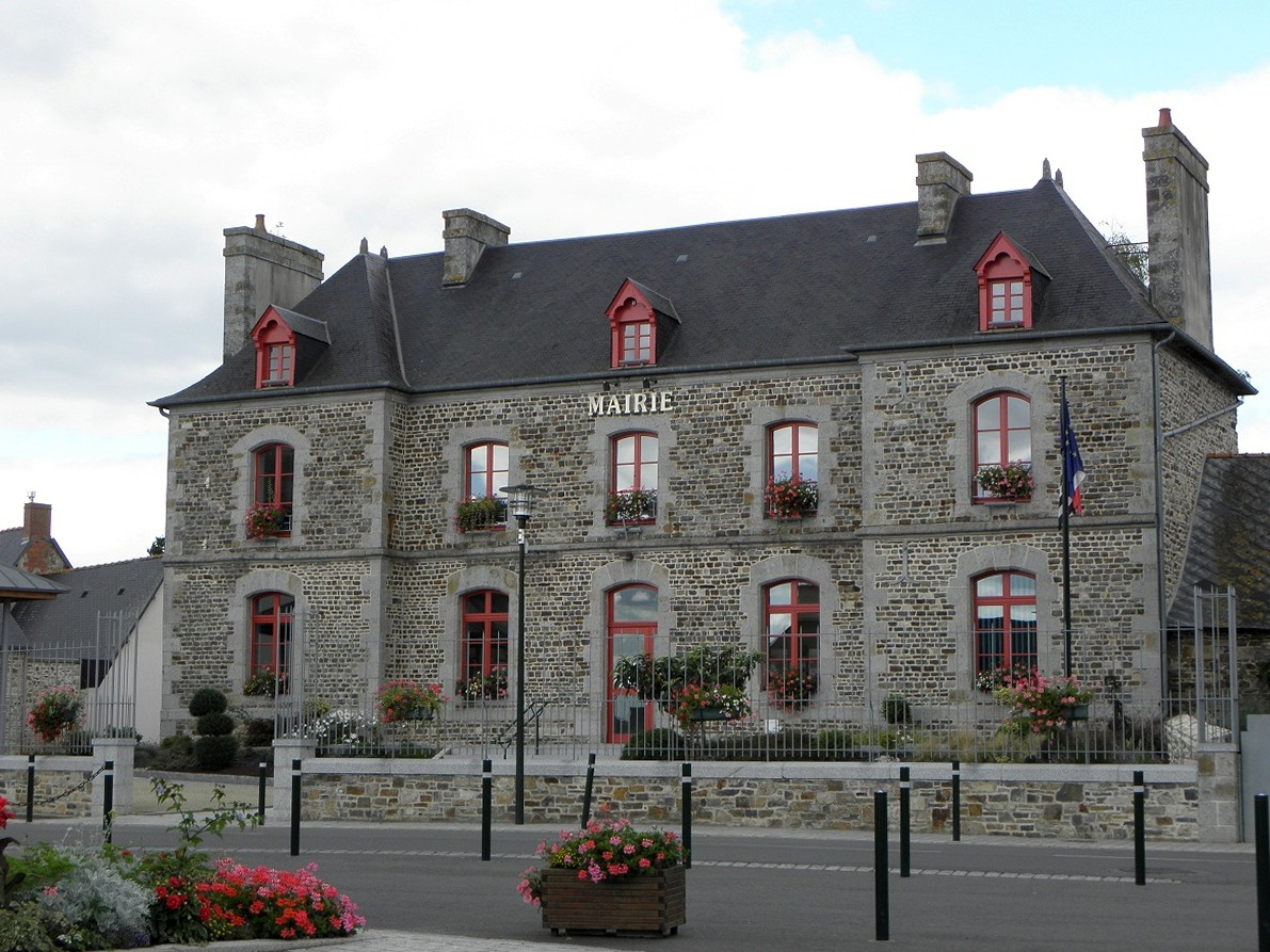 Mairie de Saint-M'Hervé (35).